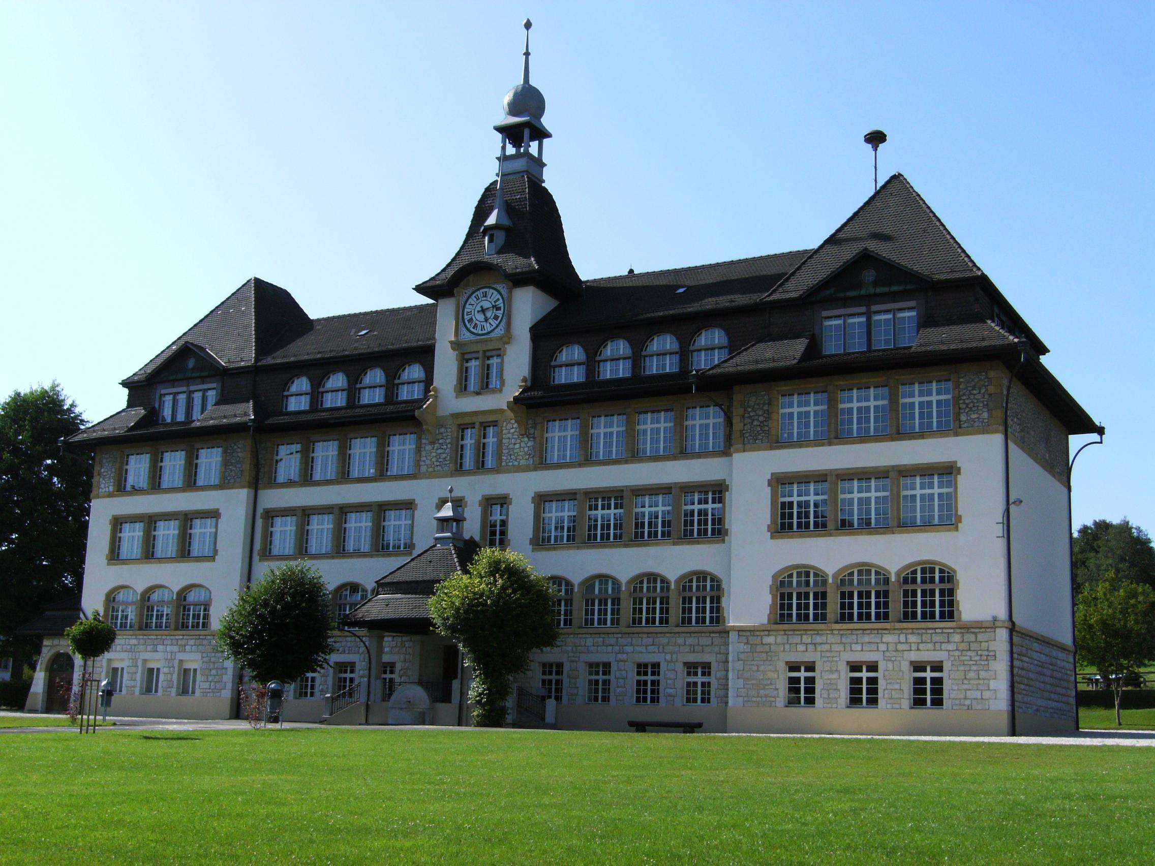 Prise de vue de l'école primaire de Reconvilier (canton de Berne, Suisse). Prise de la photo : depuis le préau de 583.750/231.600